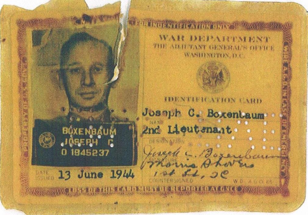 יוסף בוקסנבאום